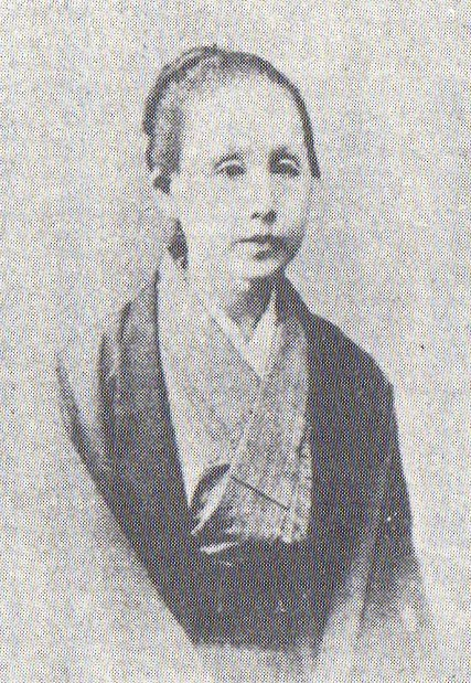 植村正久の妻季野